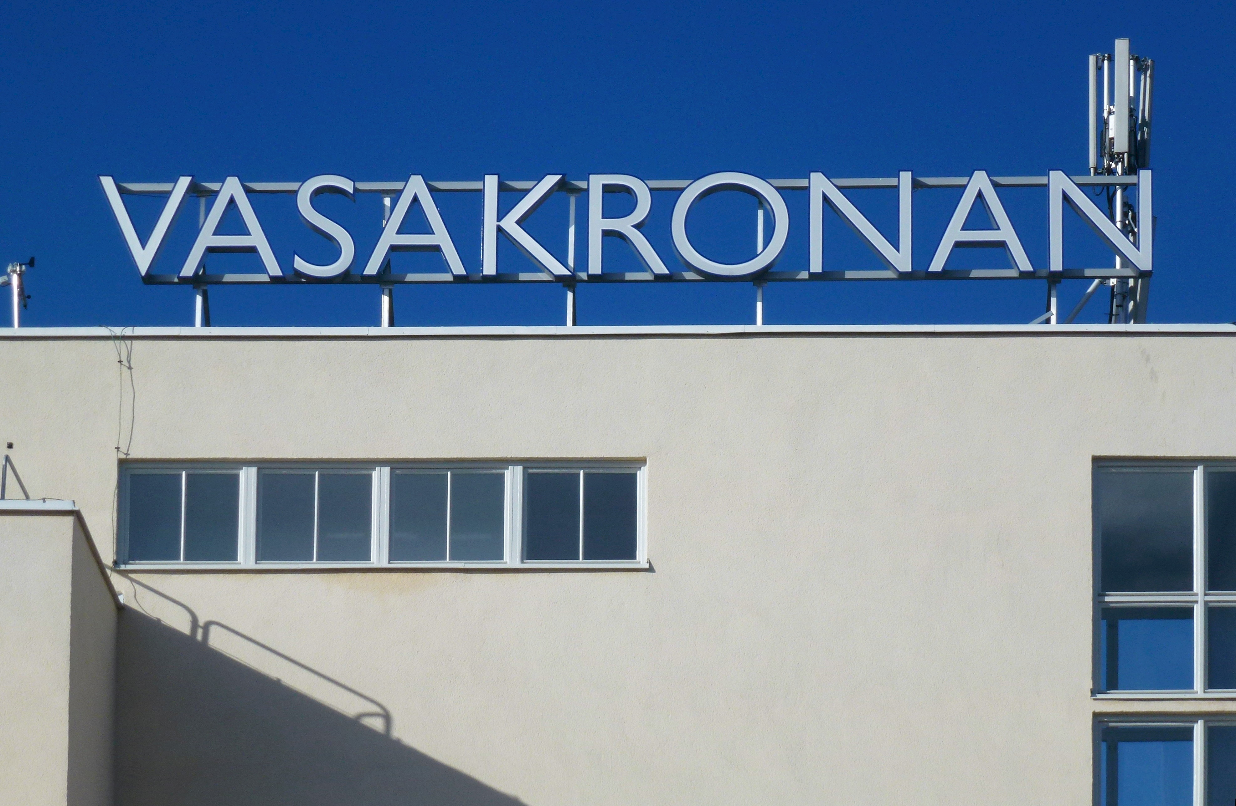 Vasakronans skylt på LM Ericssons byggnad Telefonplan